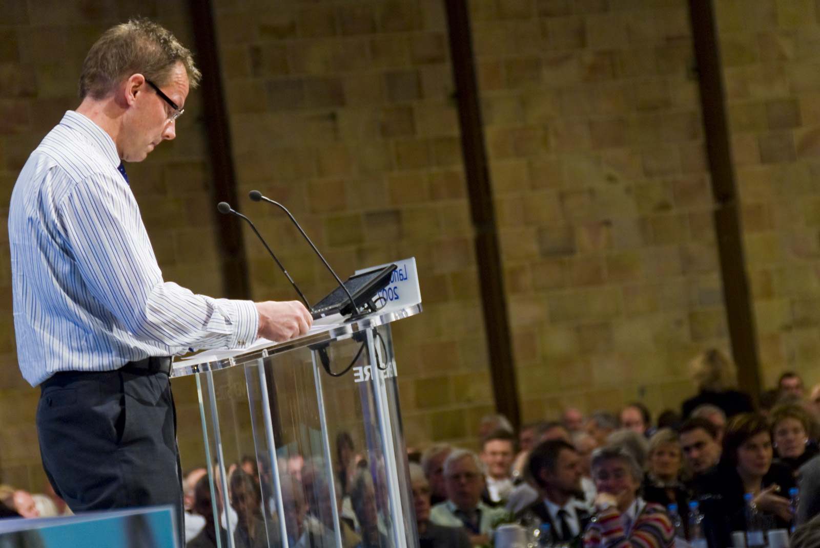 Anders G. Christensen ved Venstres Landsmøde 2007